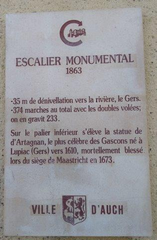 Plaque localisée en haut de l'escalier monumental d'Auch.